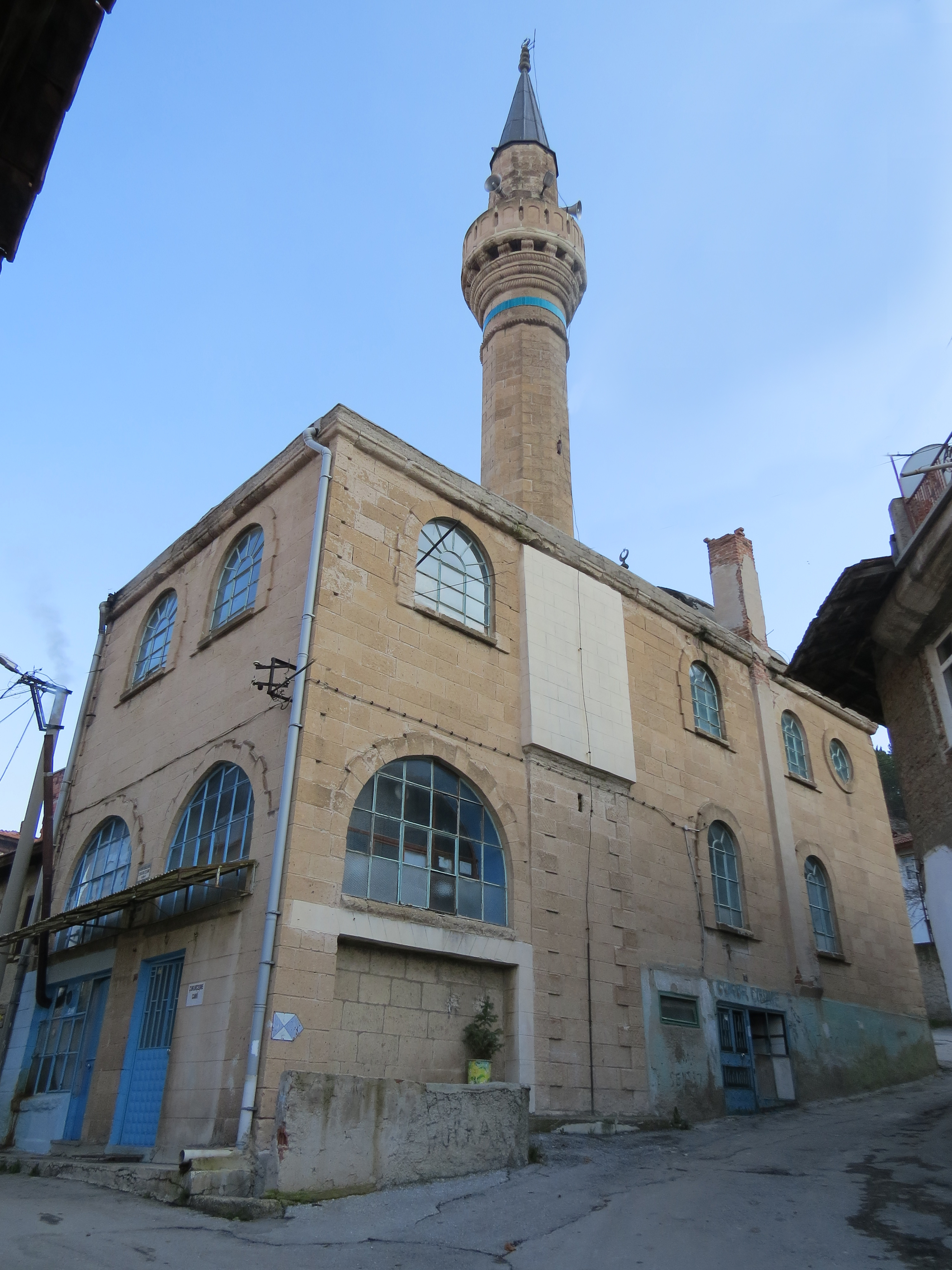 çukur çeşme camii